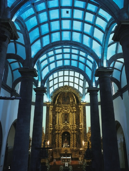 Soreasuko eliza barnealdea. Azpeitia